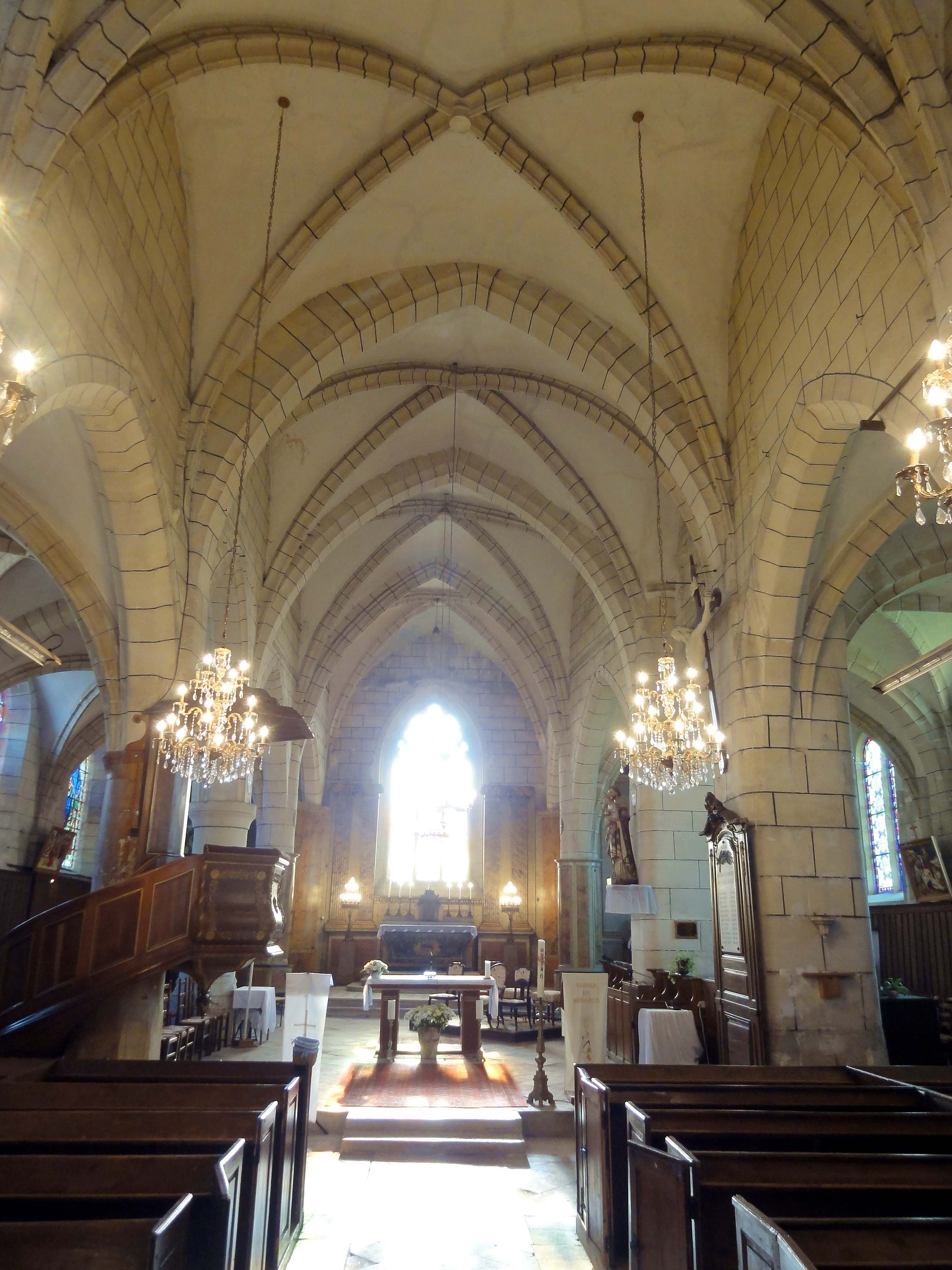 Intérieur de l'église (voir titre).